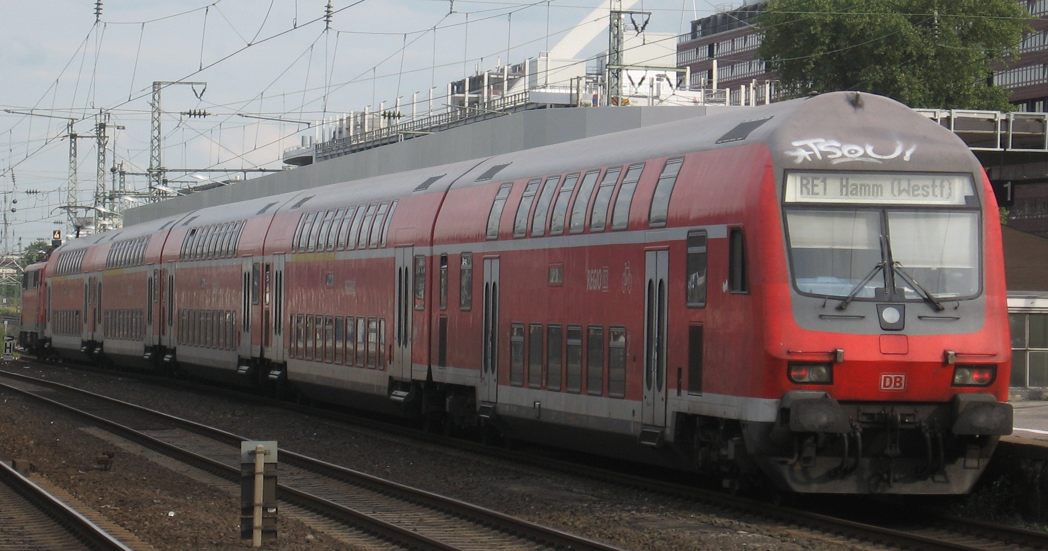 RE 1 in Köln Messe/Deutz